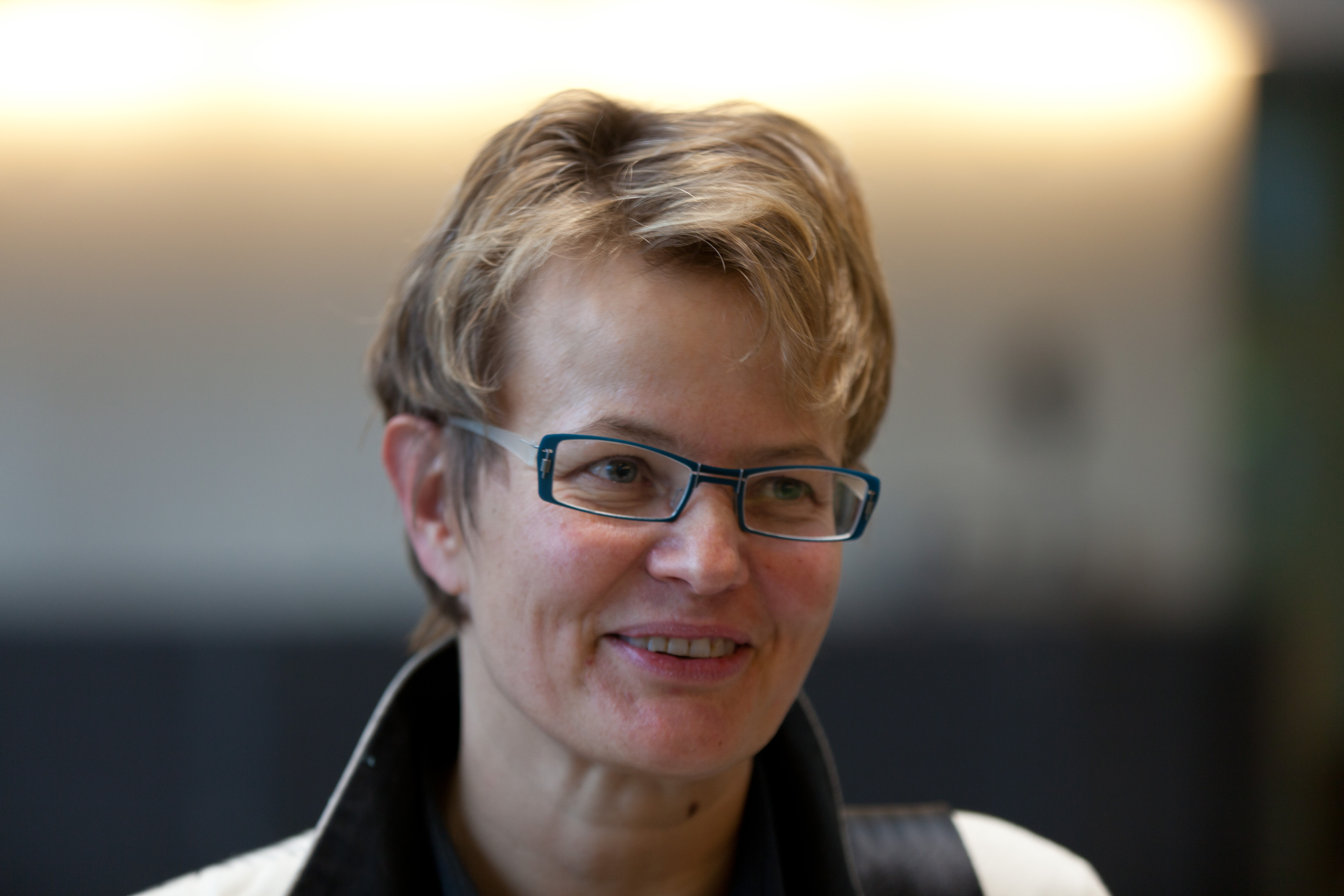 Prof. Dr. Susanne Baer LL.M., Richterin am deutschen Bundesverfassungsgericht